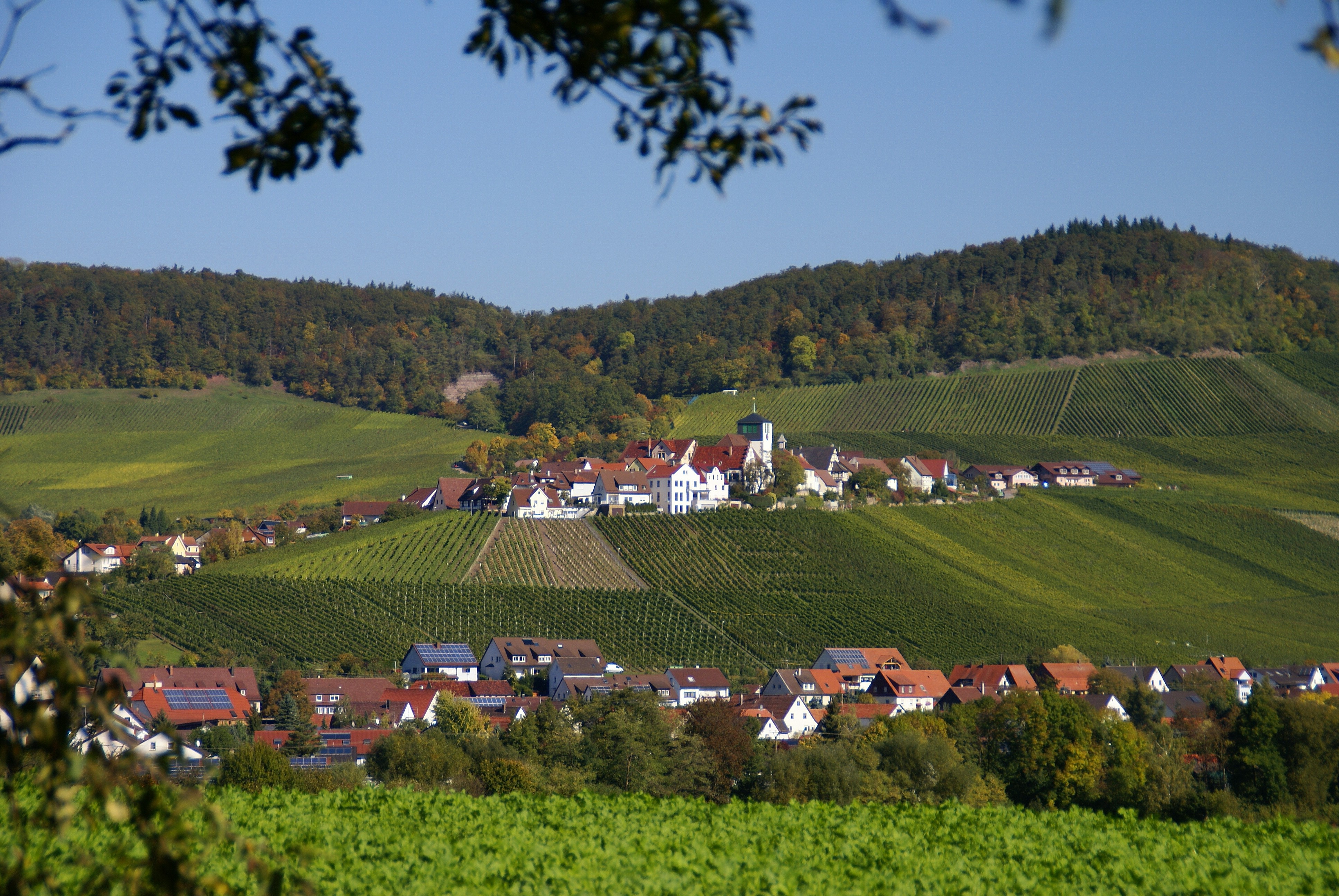 Hohenhaslach 10/2010